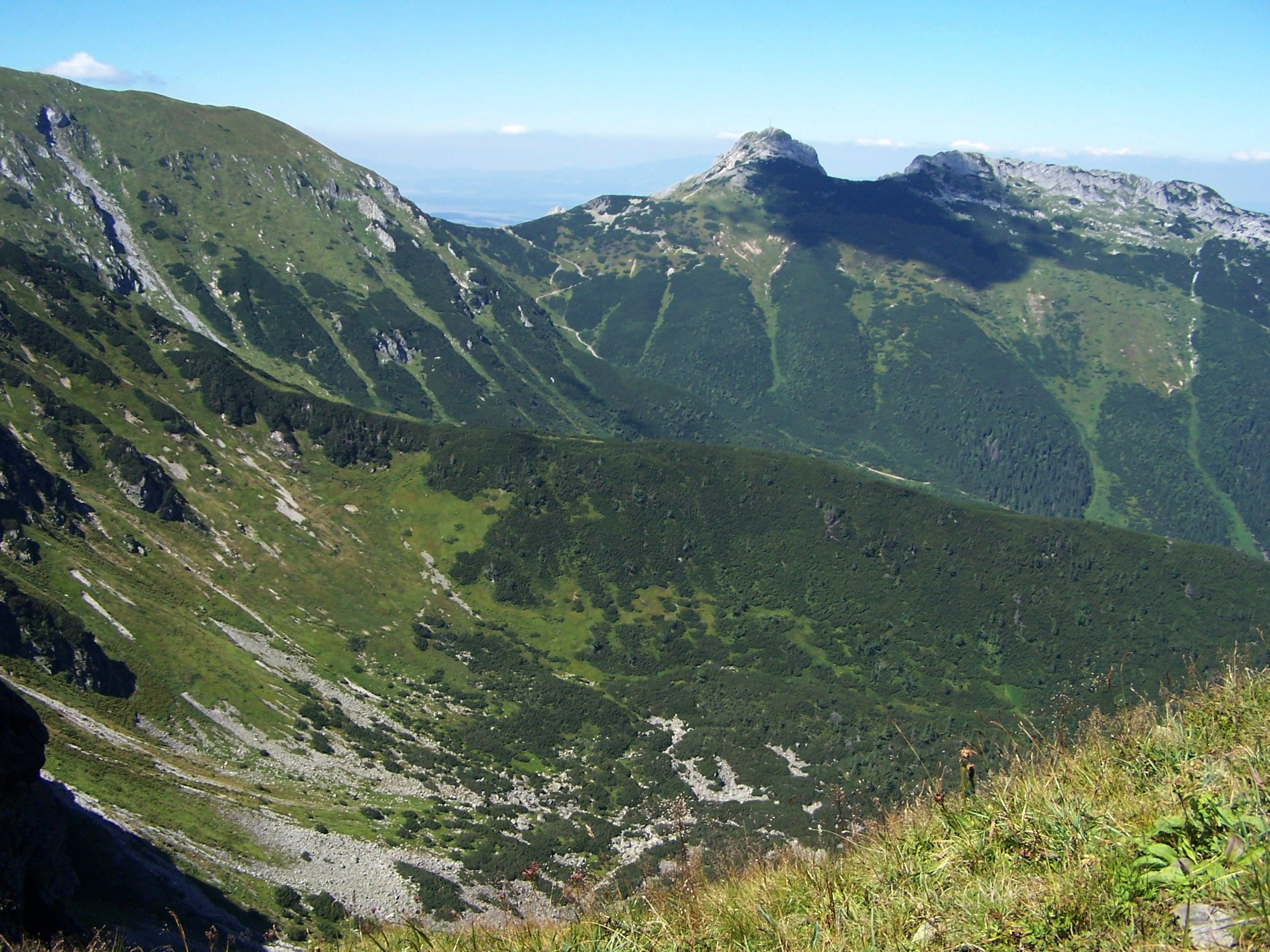 Na pierwszym planie Dolina Sucha Kondracka i grzbiet Łopata. W tyle Kopa Kondracka, Kondracka Przełęcz i Giewont